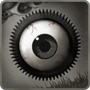 Freeze! App Icon